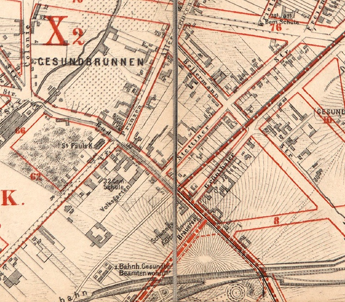 Umgebung des Gesundbrunnens mit Badstraße auf dem Plan von 1882